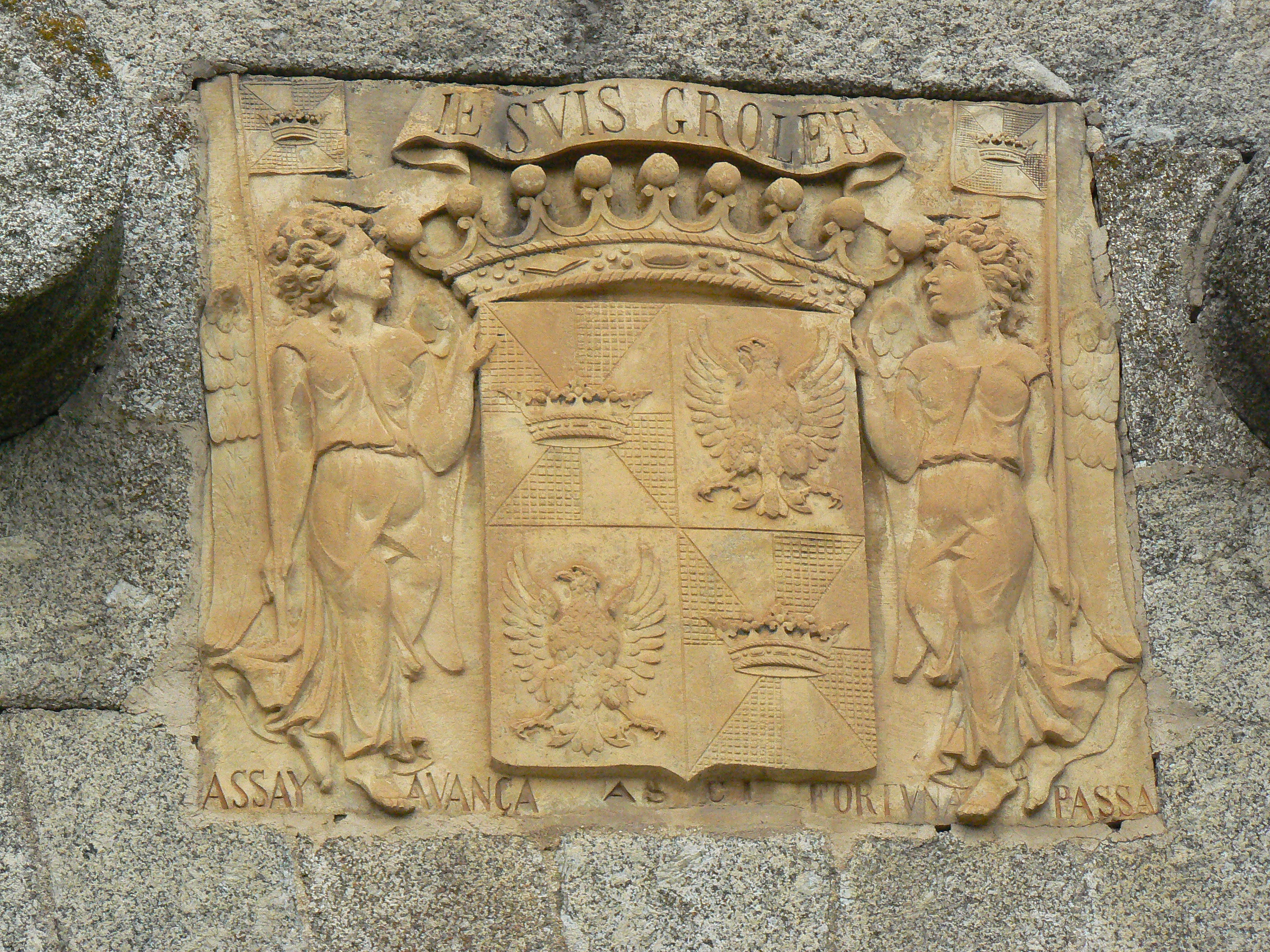 Château de la Baume sur la commune de Prinsuéjols en Lozère (France) : détail du fronton.